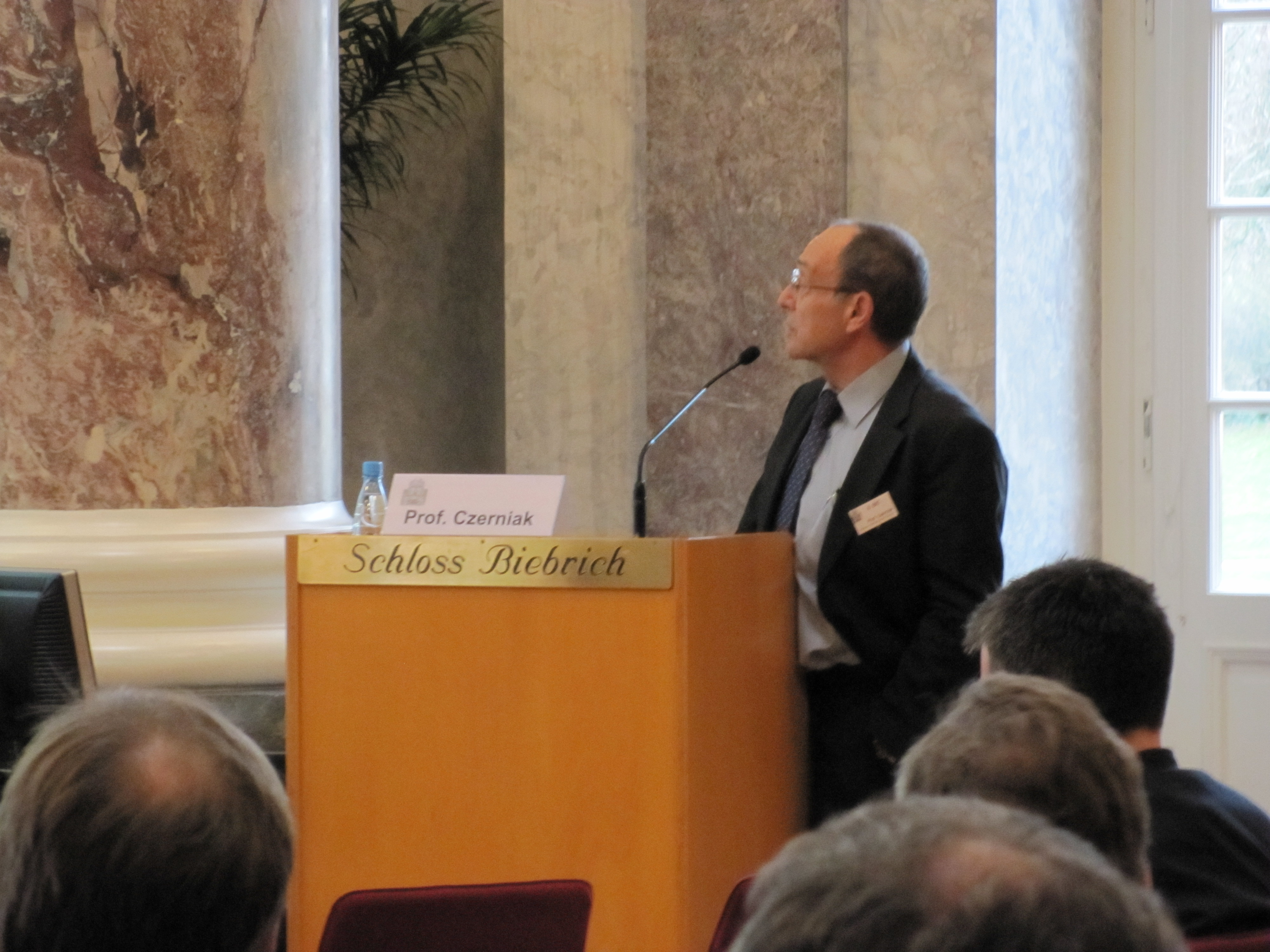 צ'רניאק בכנס